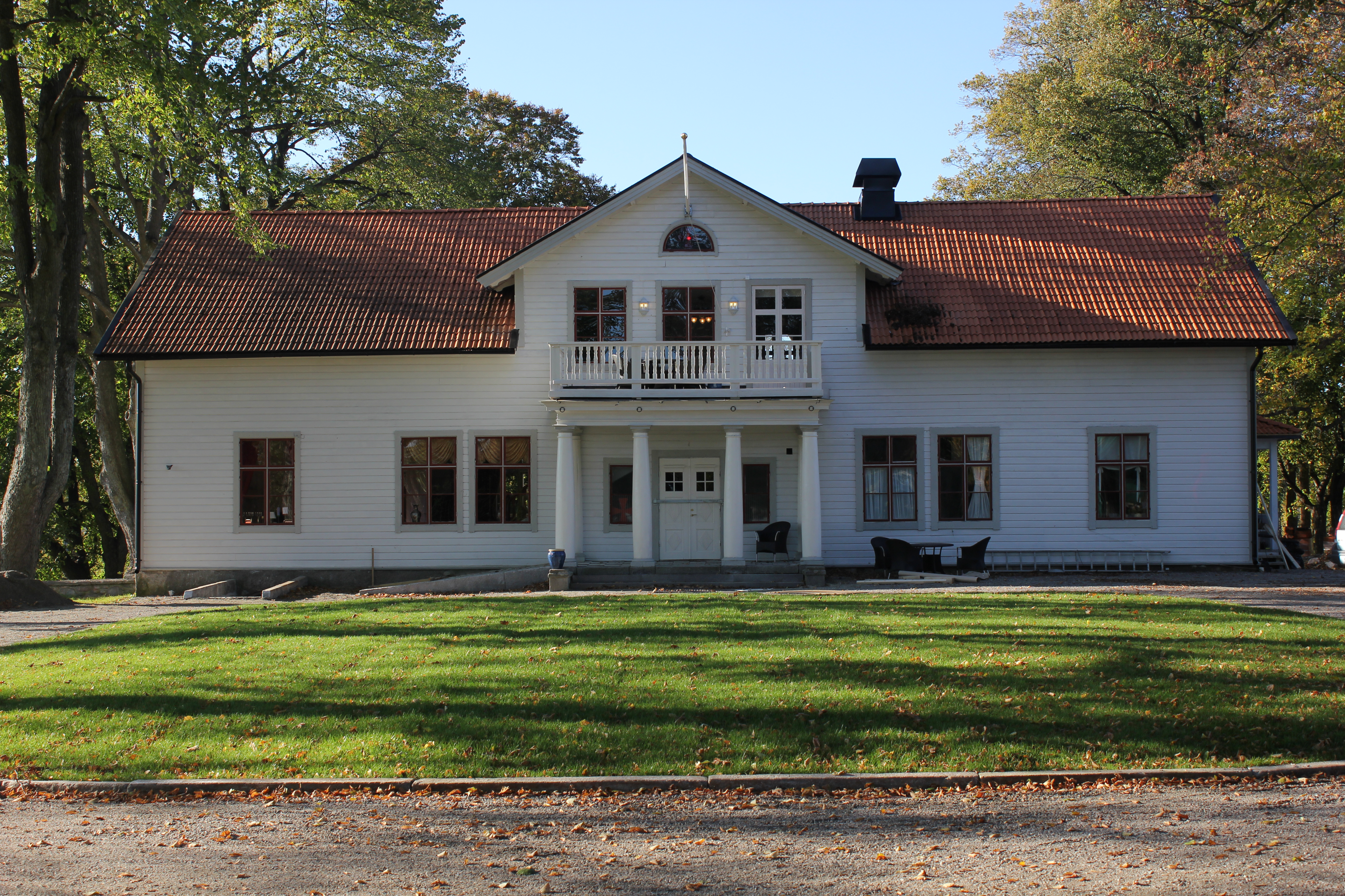 Igelsta gård i Östertälje